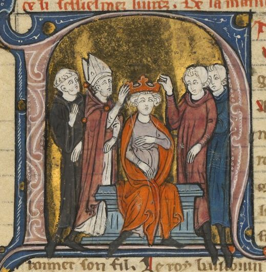 Couronnement de Baudouin III